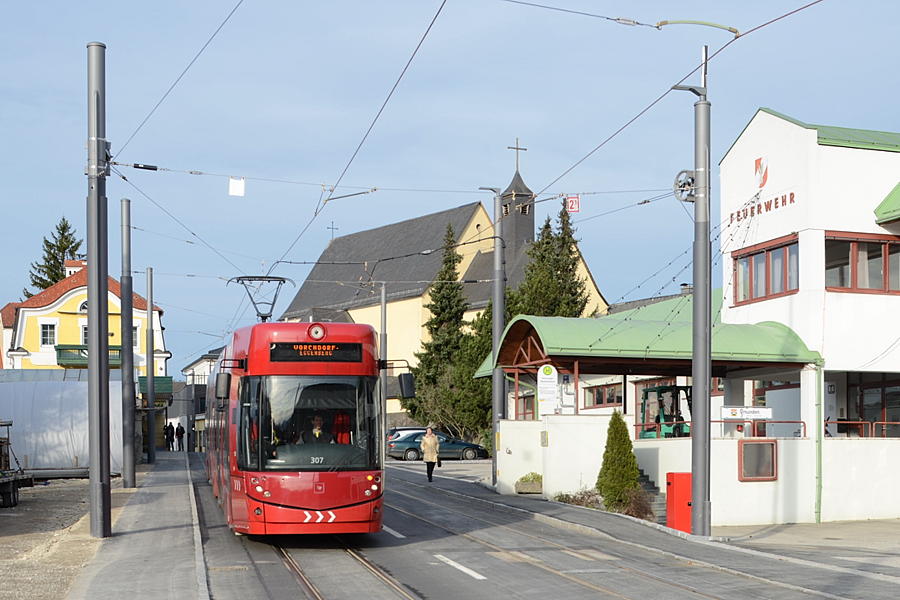 IVB-Triebwagen 307 in Gmunden zwischen Klosterplatz und Seebahnhof